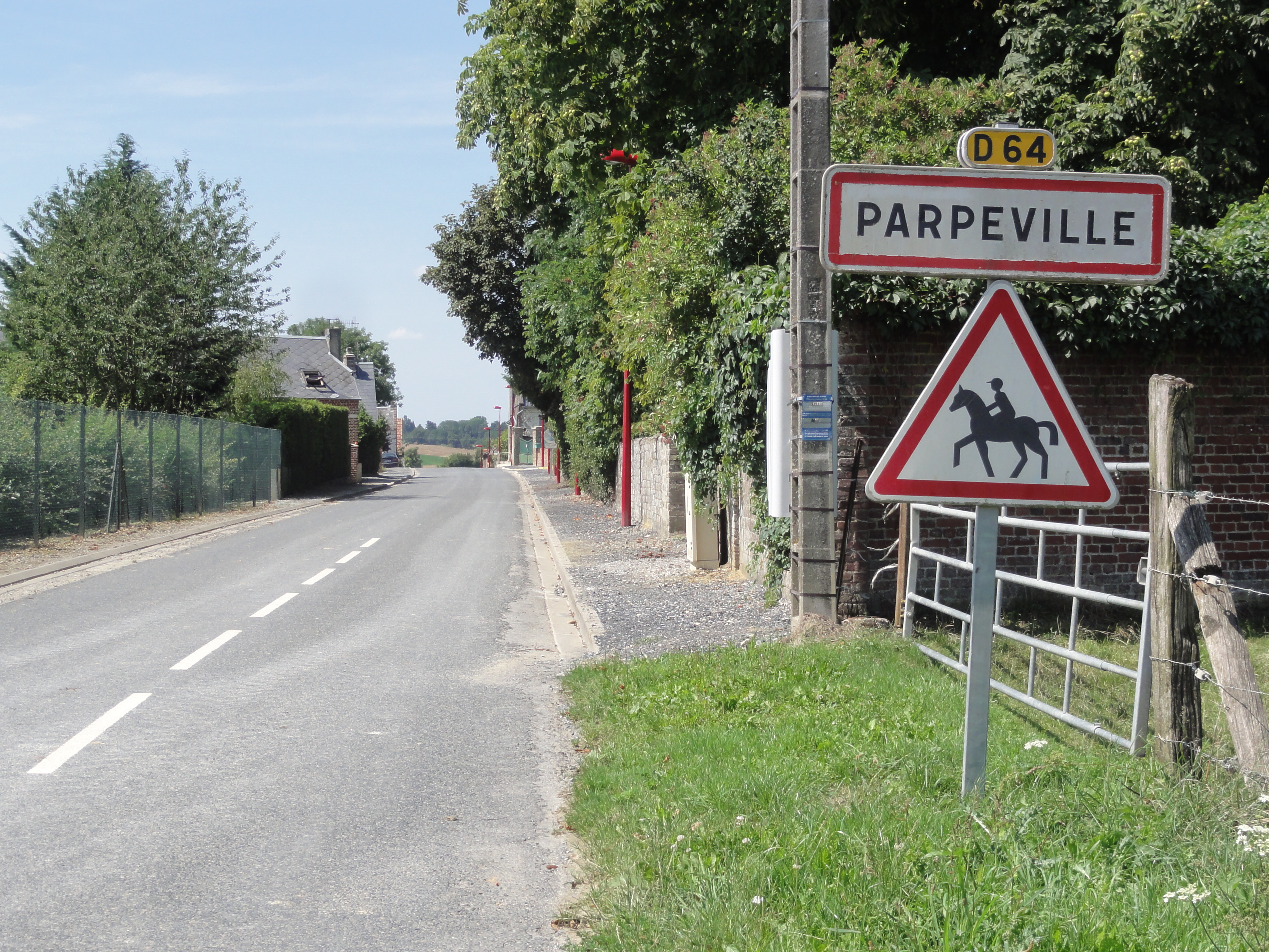 Parpeville (Aisne) city limit sign